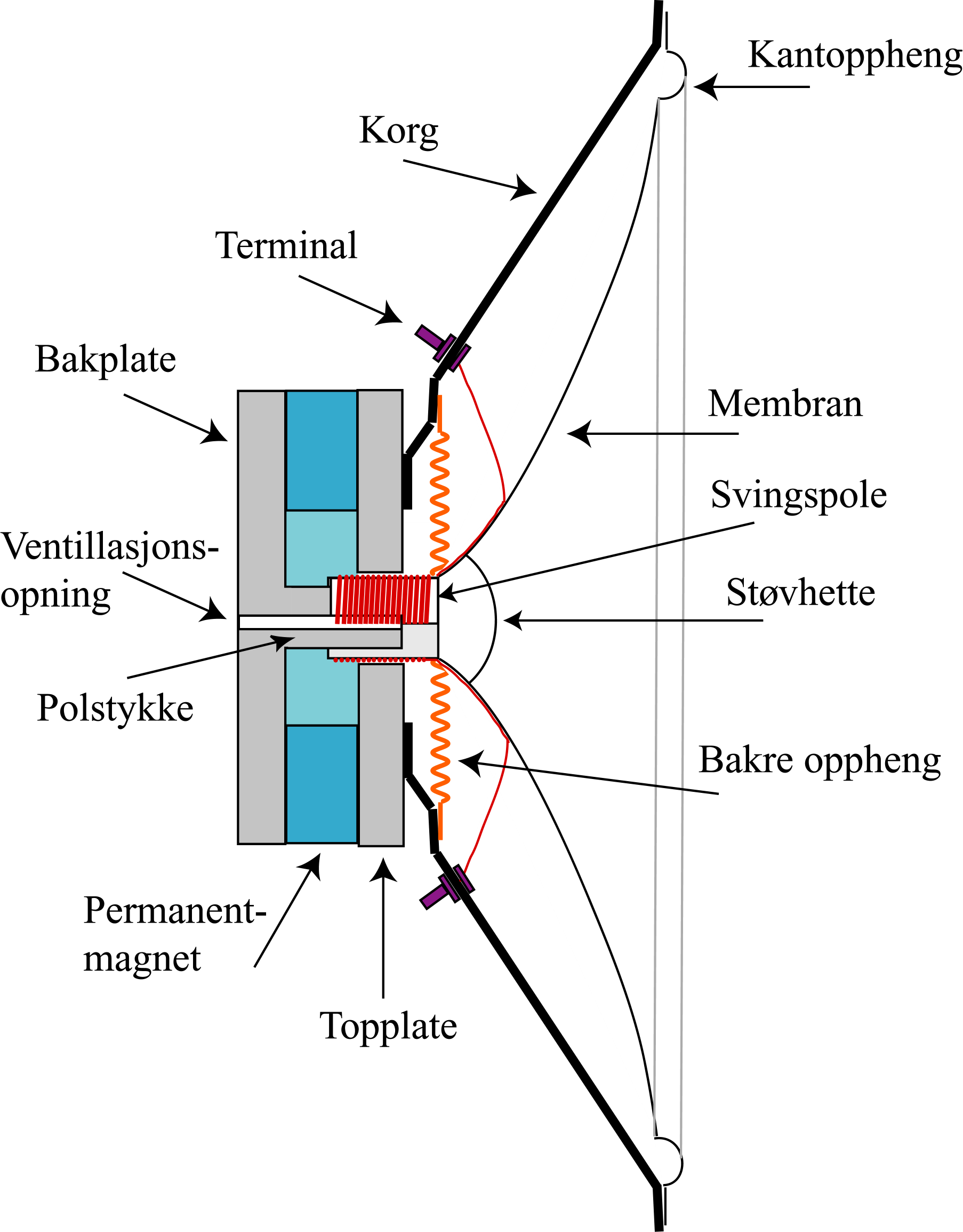 Elektrodynamisk høgtalar: Dynamisk høgtalarelement / Elektrodynamisk høgtalarelement, sett frå sida.